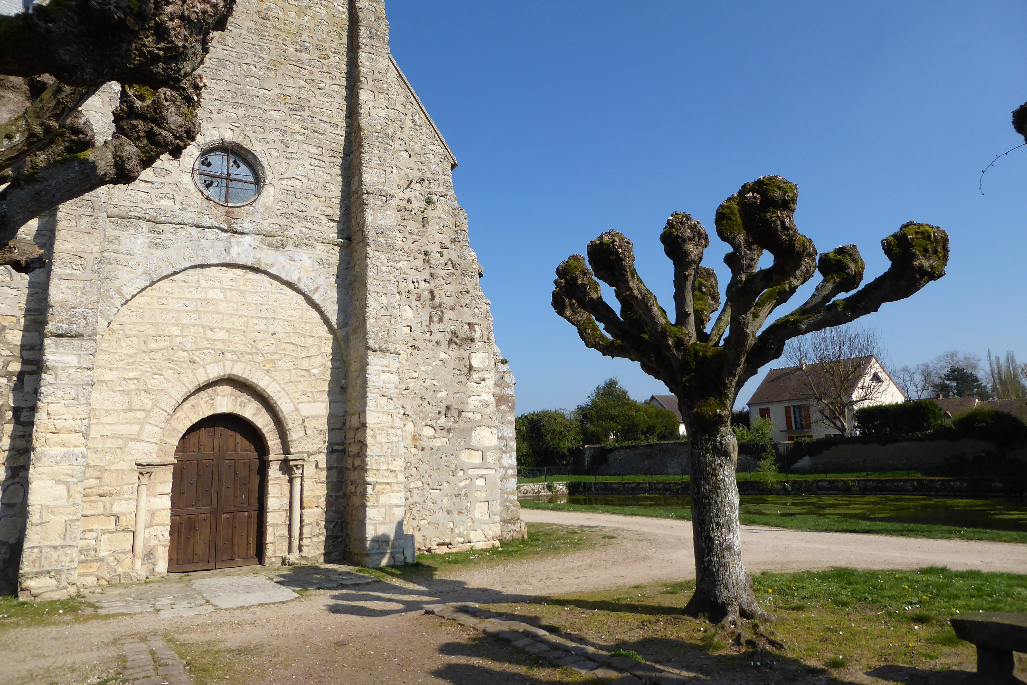 Façade ouest de l'église Saint-Aignan et mare de Goussainville, Eure-et-Loir, France.